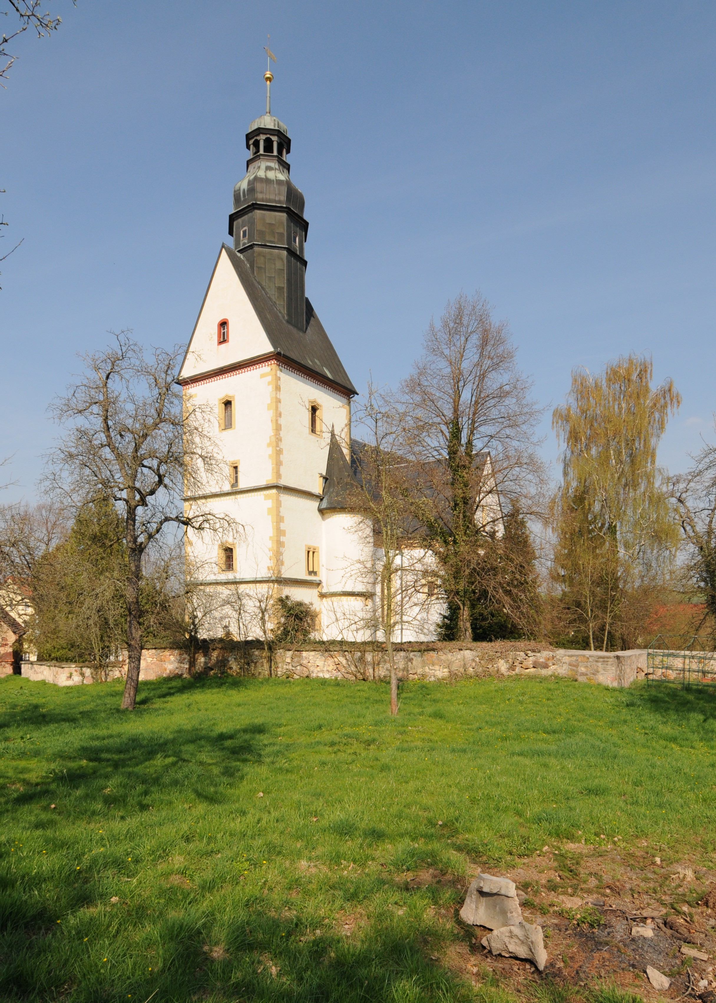 Kirche in Gnandstein (Sachsen, Deutschland)